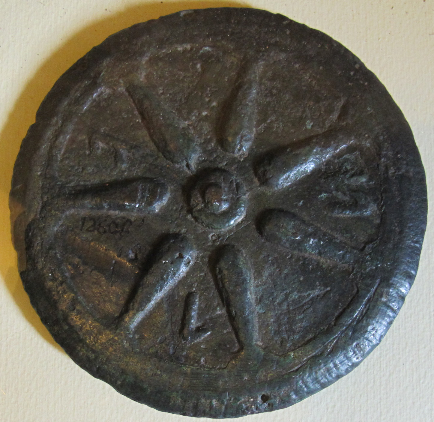 Museo Archeologico Nazionale G.C.Mecenate - MIBAC This is a photo of a monument which is part of cultural heritage of Italy.